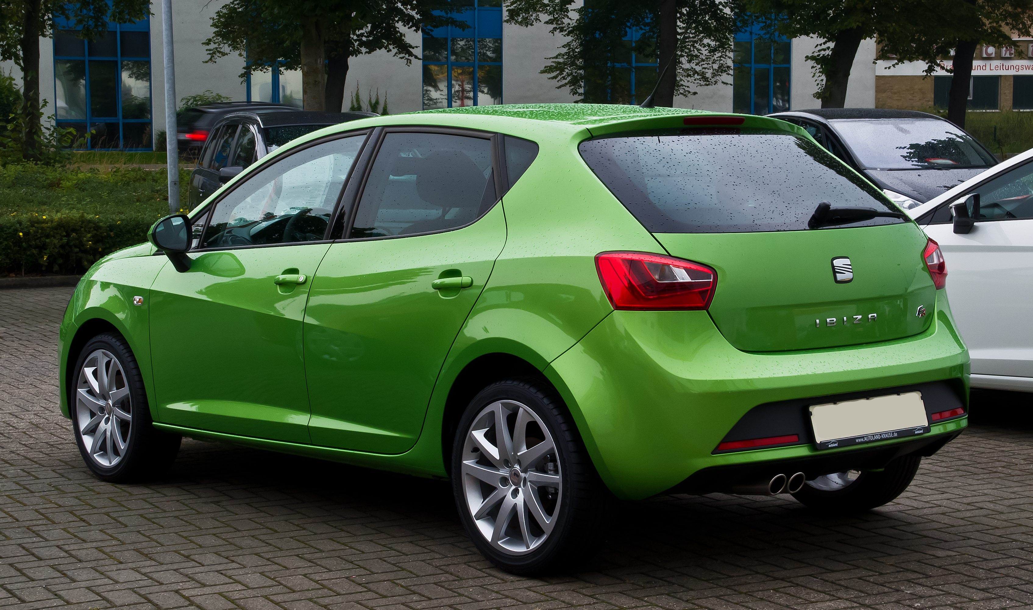 Seat Ibiza 1.2 TSI FR (6J, Facelift)